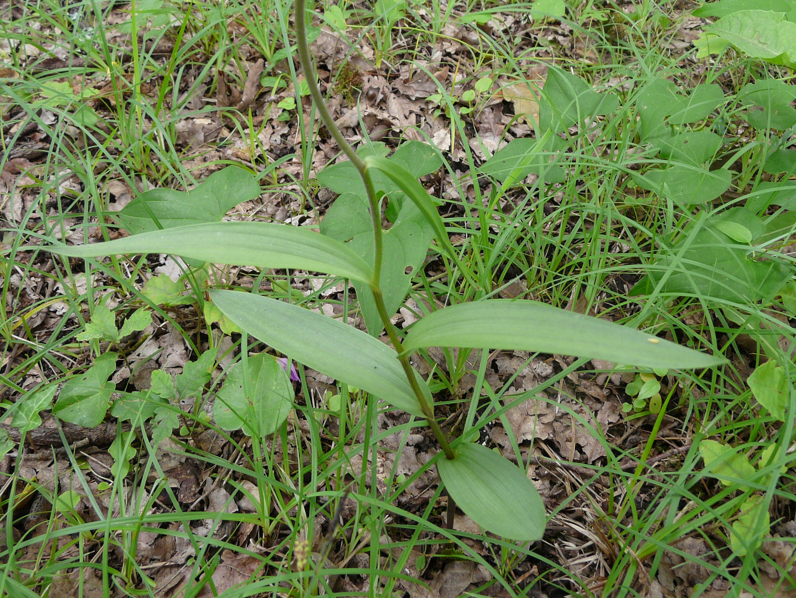 Feuilles de céphalanthère rouge (Cephalanthera rubra), Trélissac, Dordogne, France.